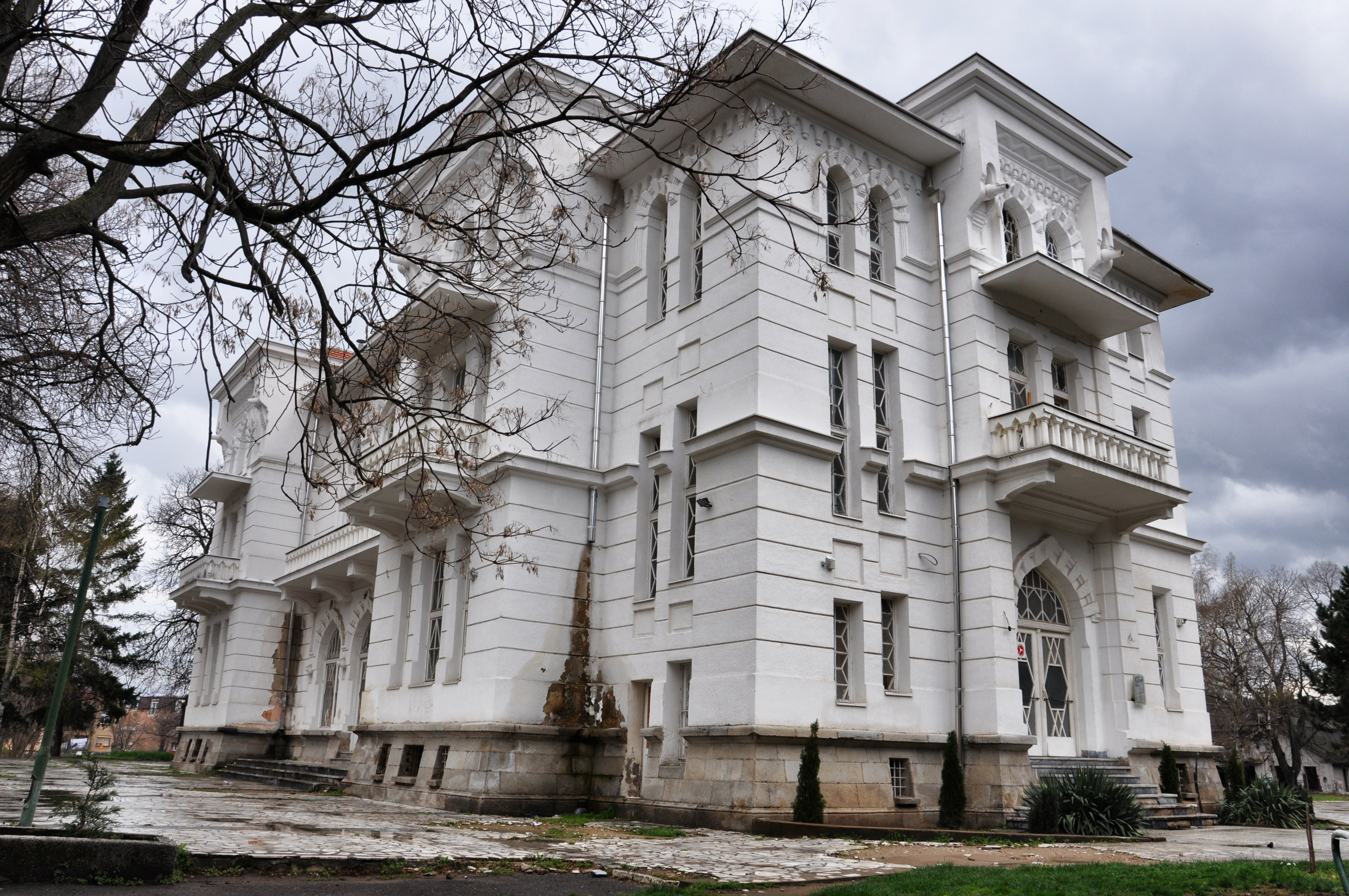 Офицерскиот дом во Битола сликан аголно преку ден